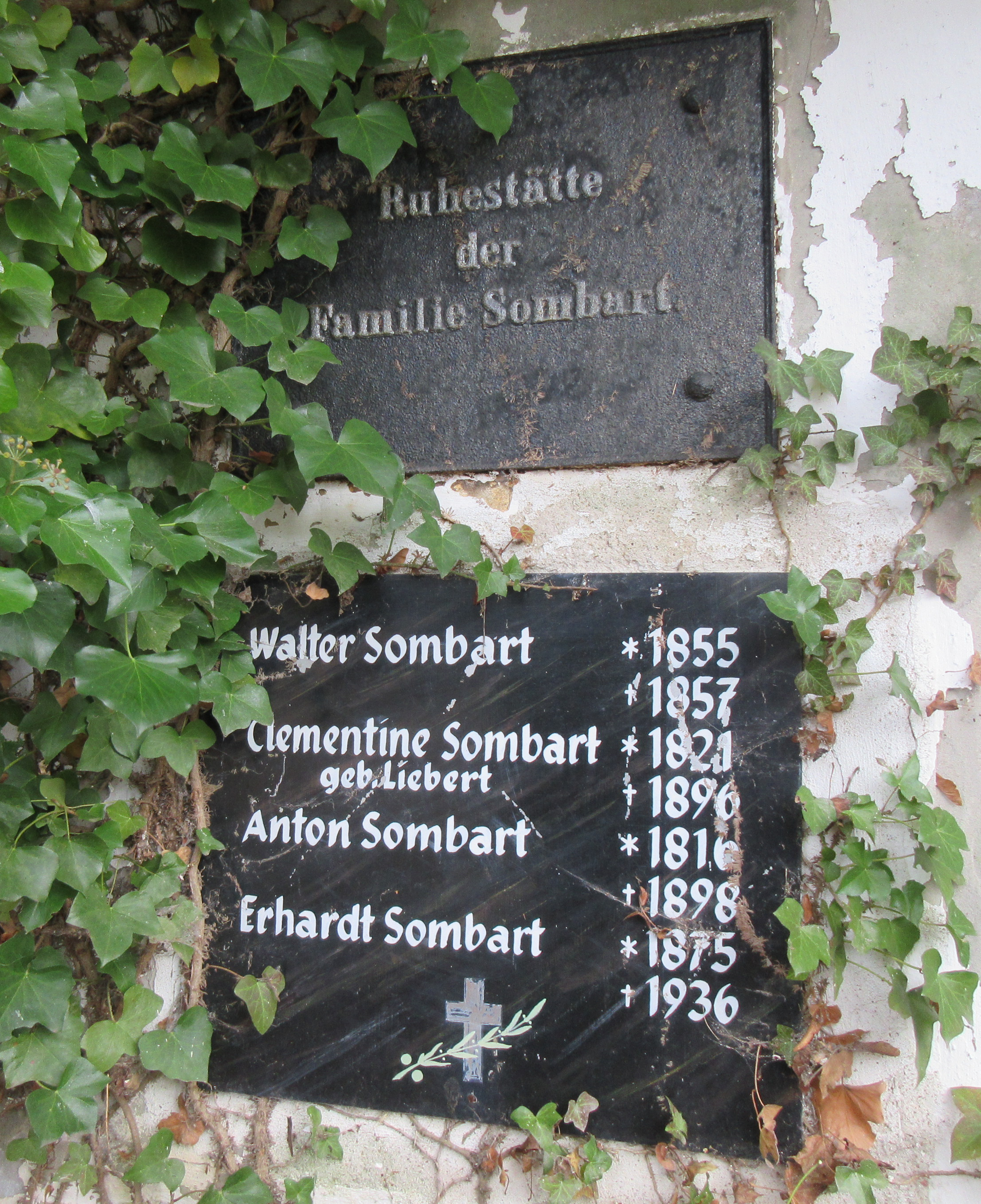 Familiengrab Sombart auf dem Friedhof Ermsleben